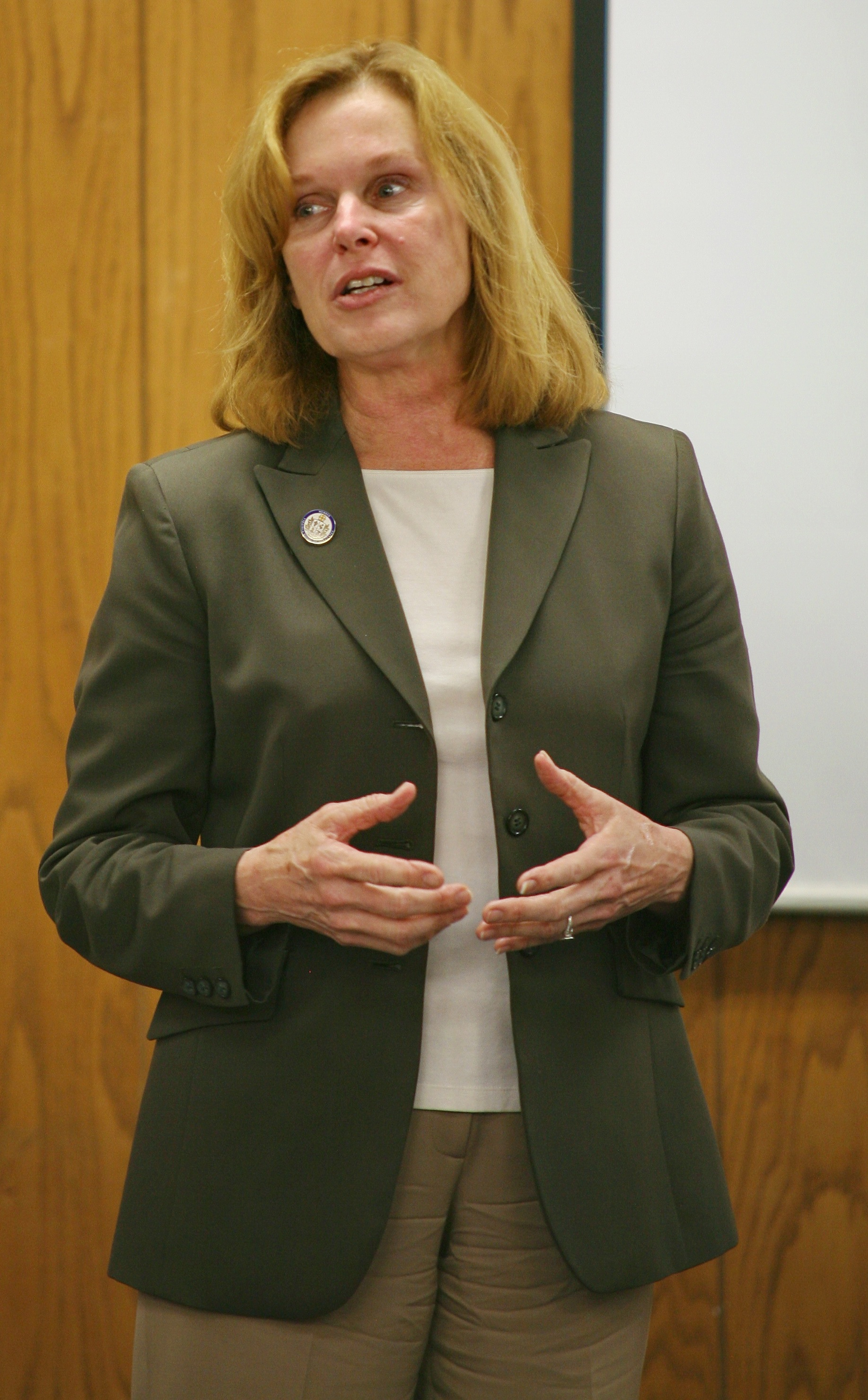 VA Delegate Kaye Kory